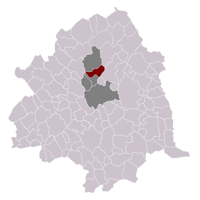 Marquette-lez-Lille dans son canton et son arrondissement